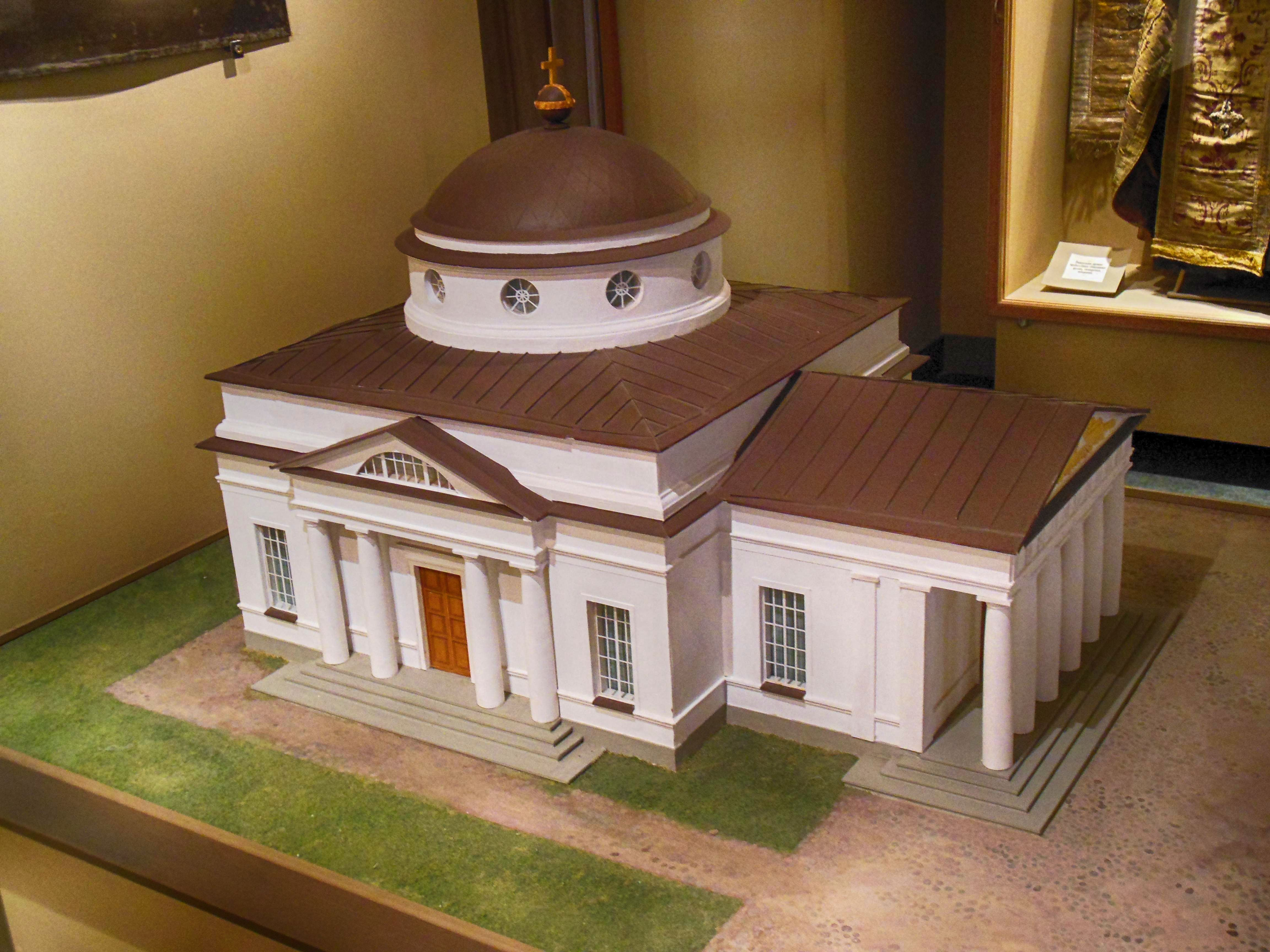 Беларуская (тарашкевіца): Магілеўскі музэй этнаграфіі, экспазыцыя -Губернскі Магілеў